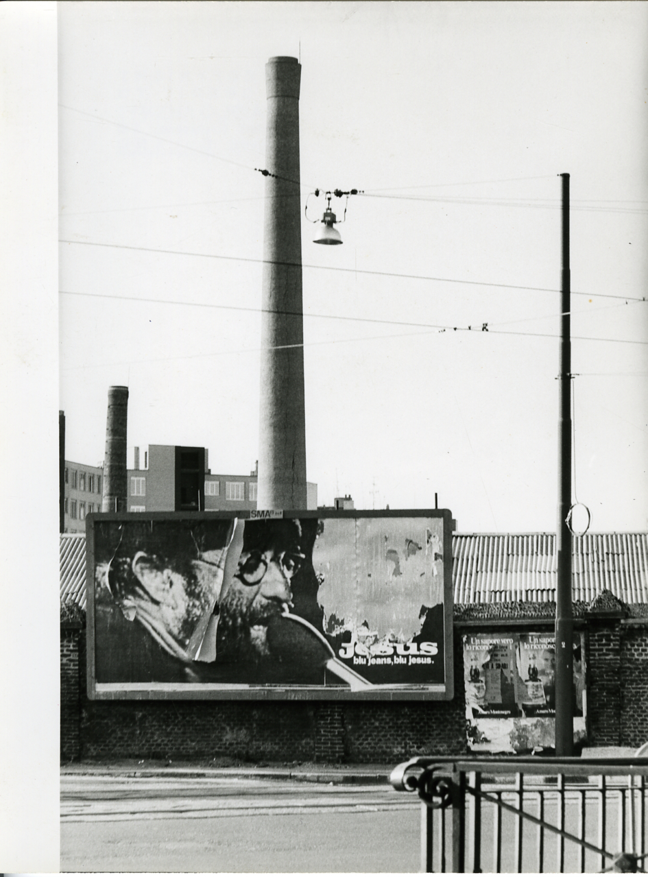 Milano. Periferie. Serie fotografica : Milano, 1980 / Paolo Monti, Istituto di fotografia Paolo Monti. - Stampe: 4 : Positivo b/n, gelatina bromuro d'argento/ carta, 18x24. - ((Sul coperchio della scatola, manoscritto a pennarello: "Milano periferie". - Porta Ticinese